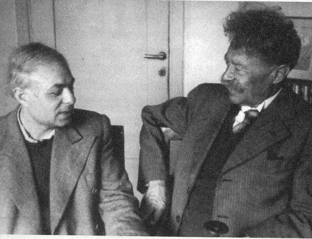 אברהם ברוידס, "משורר הנוער העובד" ומזכיר אגודת הסופרים העבריים בא"י יחד עם המשורר שאול טשרניחובסקי.